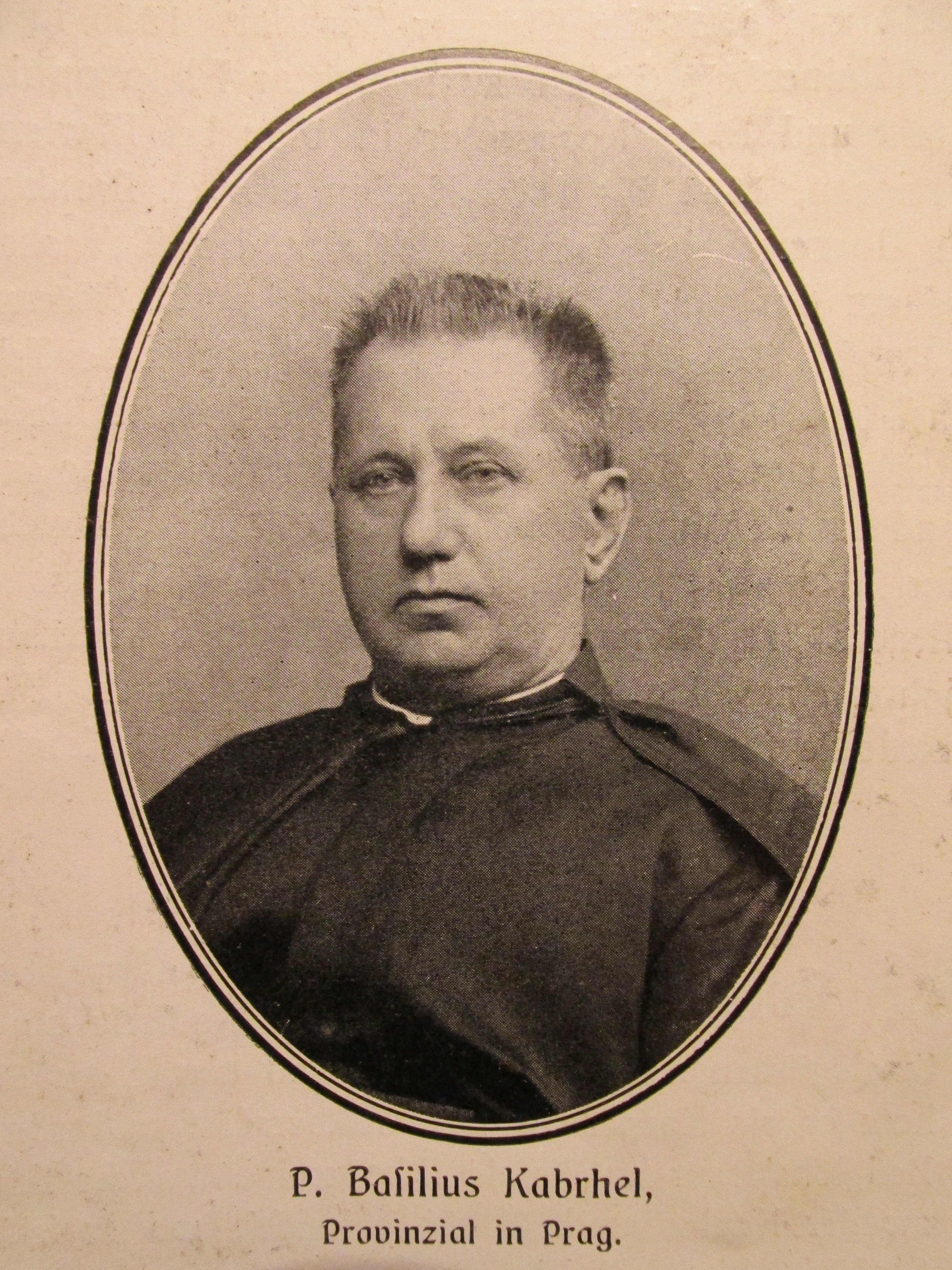 P. Basilius Karbrhel - piarista (SchP); * 20. 10. 1845 Litomyšl; gymnaziální studia na Gymnázium v Litomyšli; noviciát v Lipníku (od 1. 10. 1862); filosoficko - teologická studia v Praze a Českých Budějovicích; slavné sliby 01. 12. 1867; ord. na kněze 24. 07. 1870; provinciál v Praze; kníže arcibiskupský rada v Olomouci; arcibiskupský notář v Praze; biskupský notář v Litoměřicích; Abgeorddnert des Grossgrundbesitzers für den Landtag des Königreiches Böhmen; Ehrenbürger von Freudenthal (Schlesien) und Altwasser (Mähren)